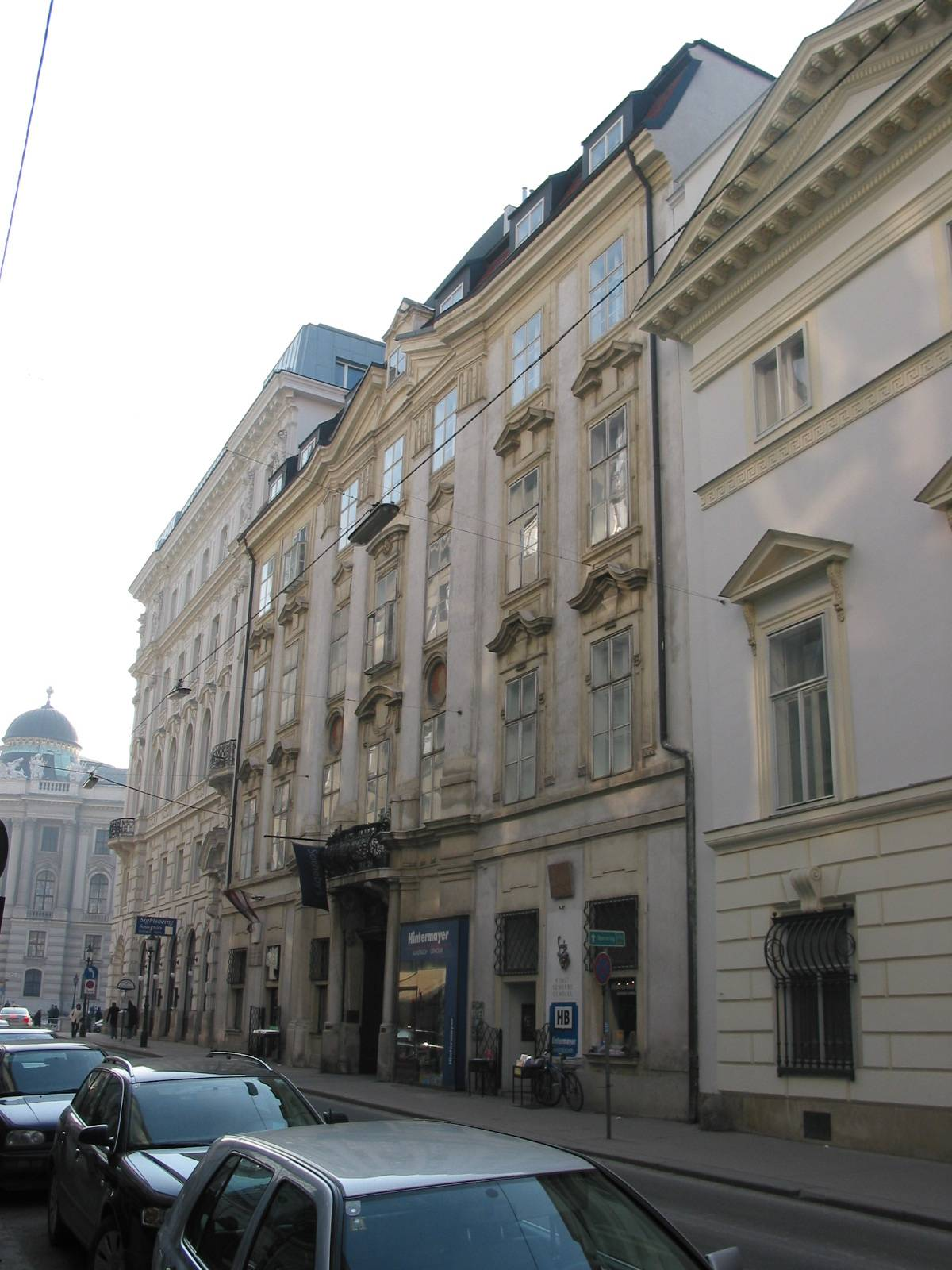 Palais Wilczek, Vienna I, 2006-01-28 selfmade photo